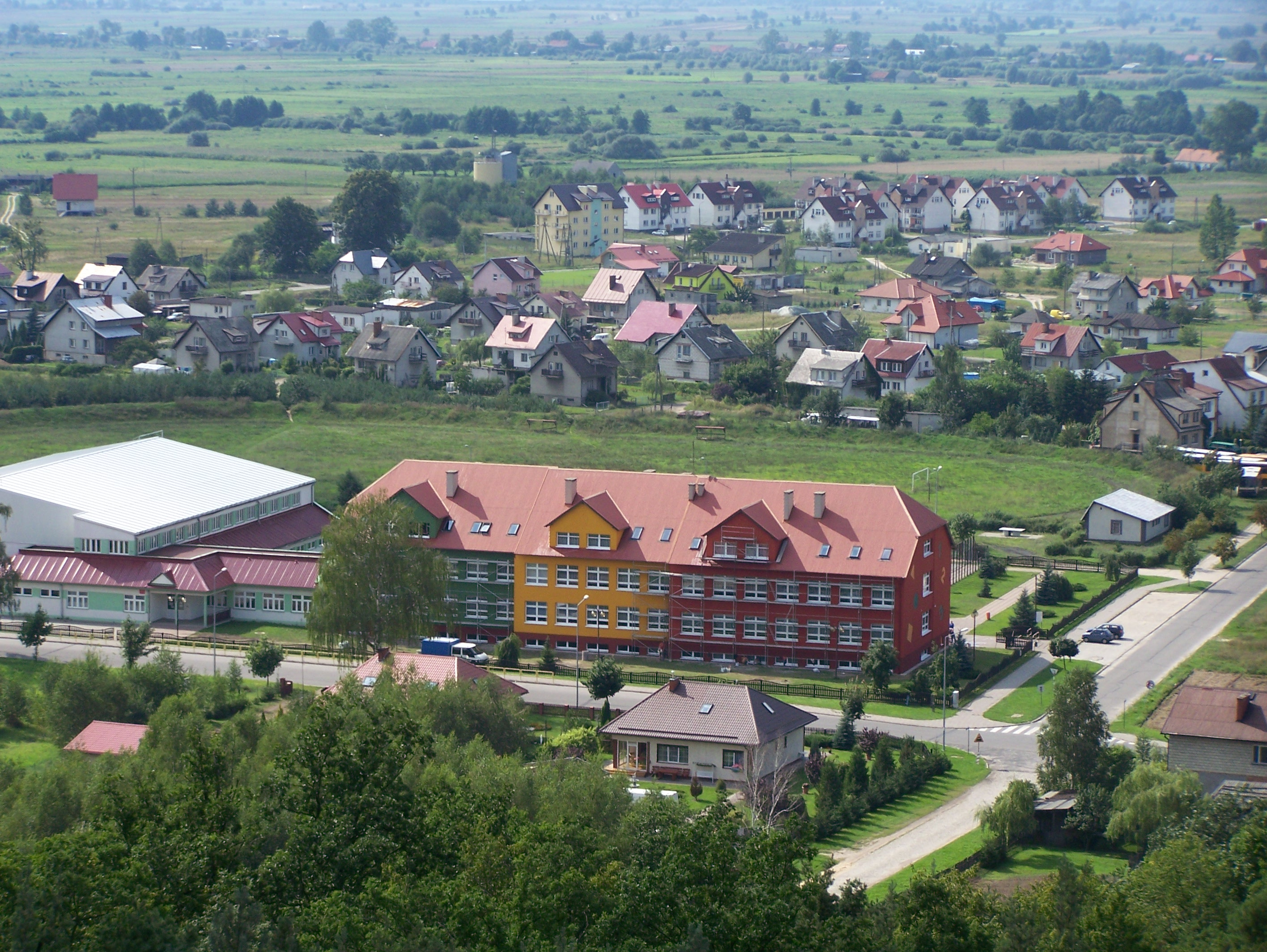 Widok z Wieży w Sadlinkach na szkołę i osiedle.